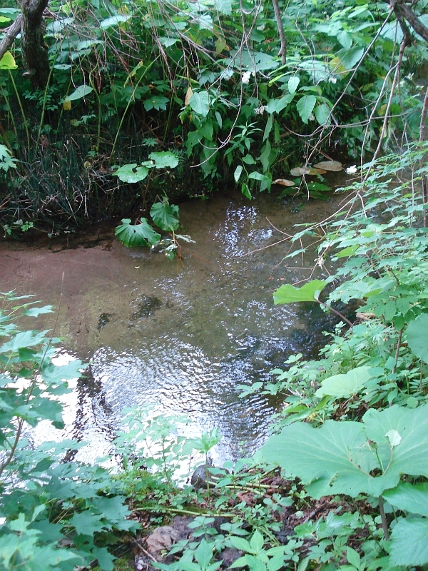 北海道・札幌市南区・清田区・厚別区・白石区・江別市を流れる厚別川。源流付近。